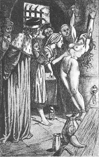 Dessins de Martin van Maële. Illustration de La sorcière, de Jules Michelet. 1911.